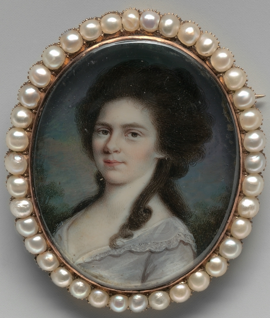 Painting, miniature; Paintings